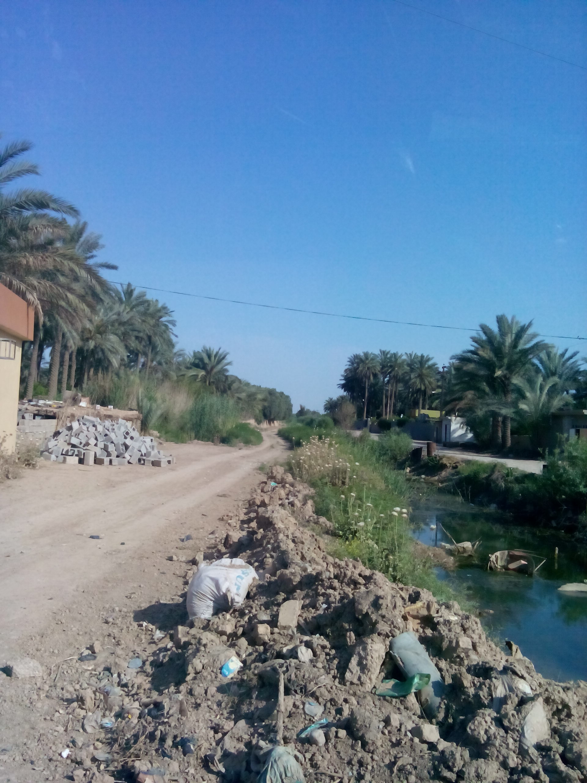 جدول العثمانية الذي يمر في بساتين في ناحية المحمودية (الأسود) التابعة لمدينة الخالص في محافظة ديالى شرق العراق